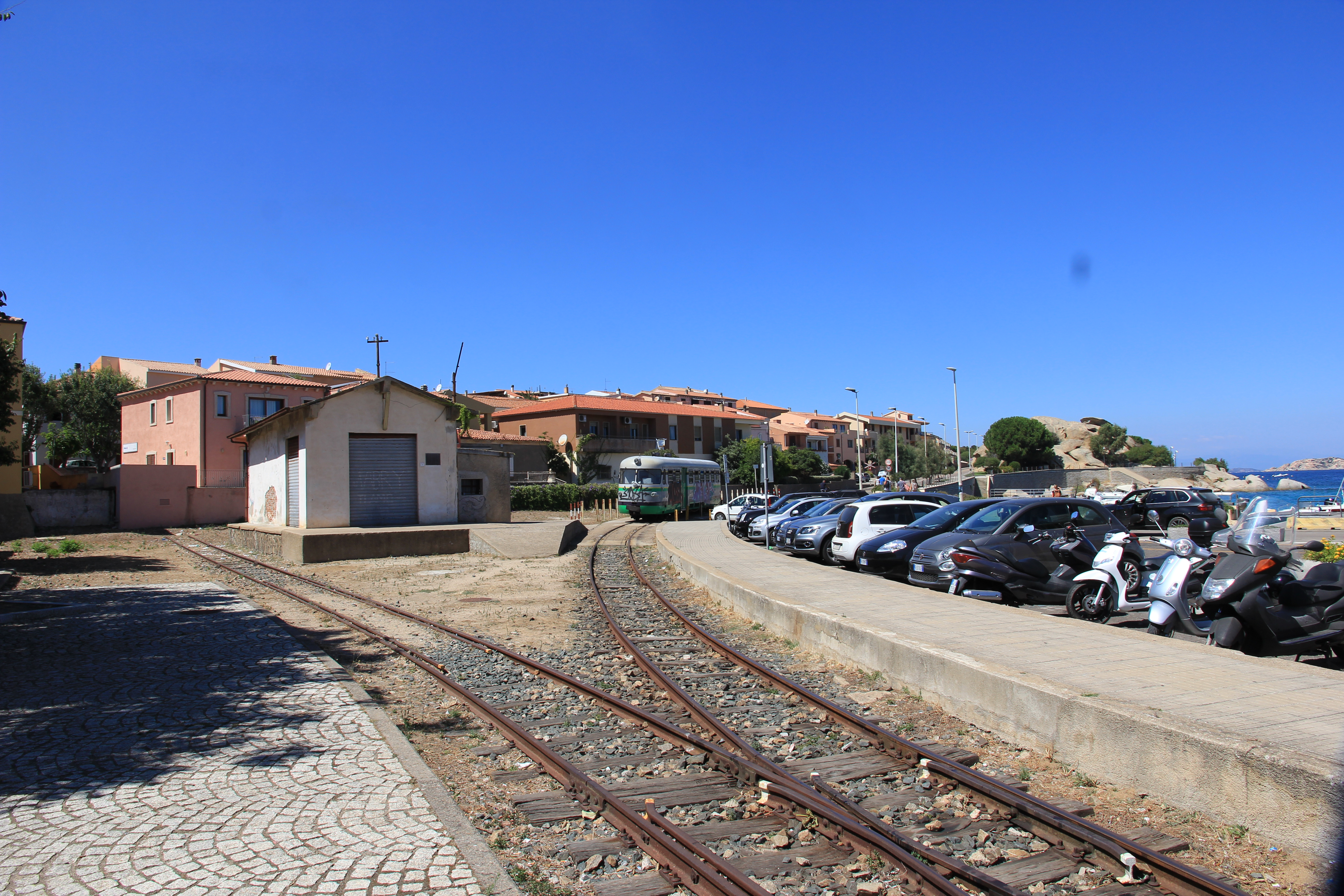 Palau, stazione ferroviaria di Palau Marina